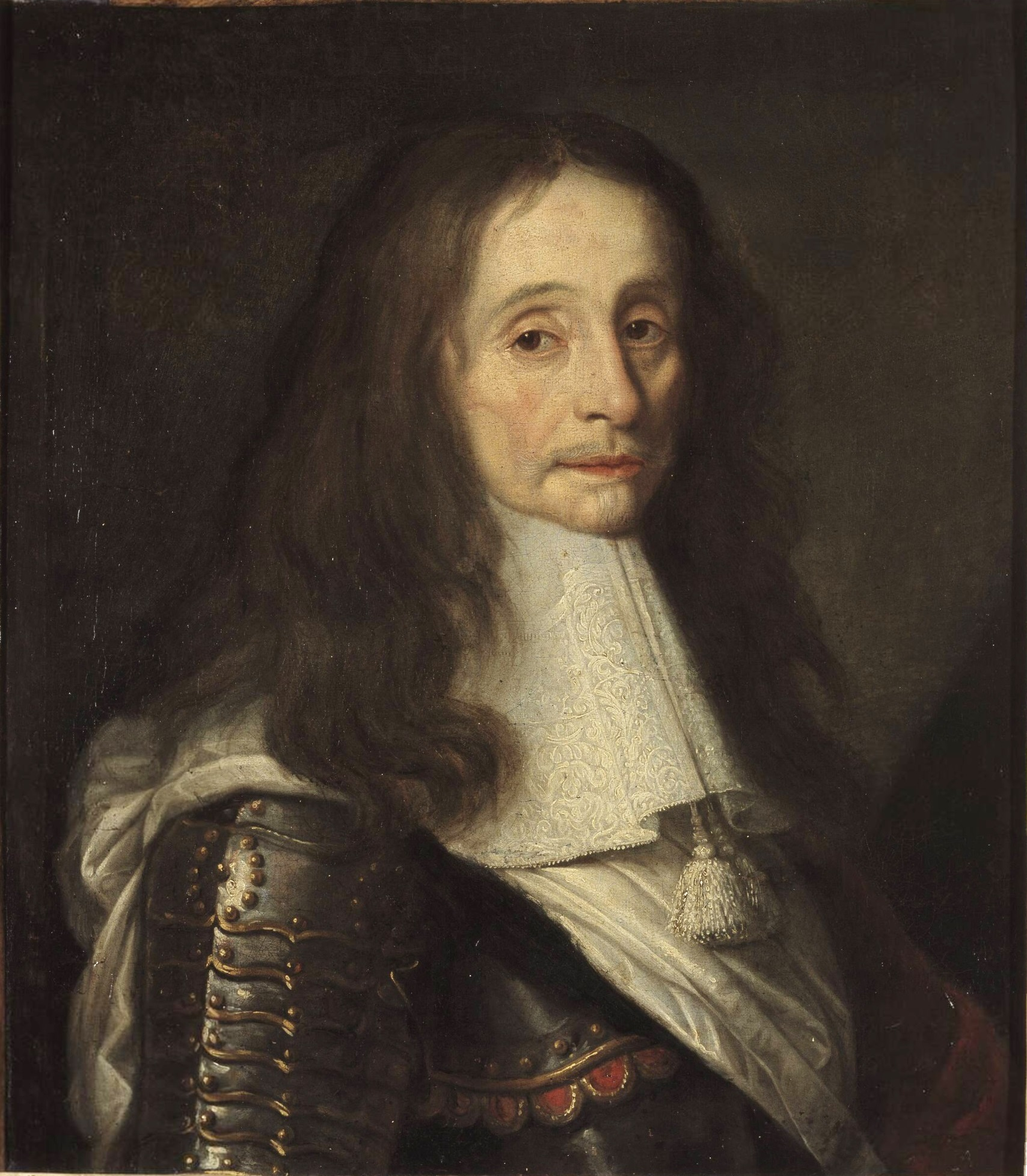 portrait en buste, de trois-quarts